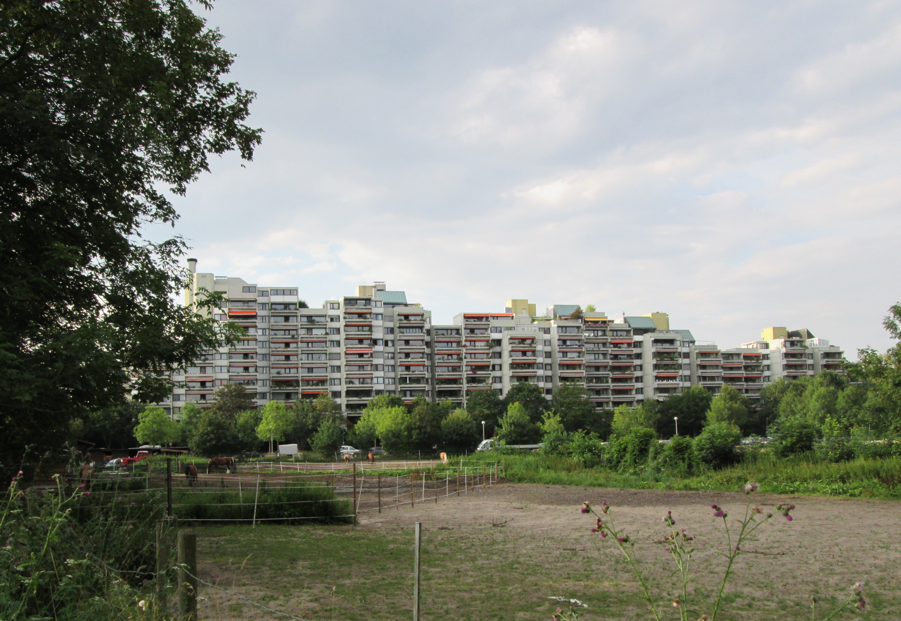 Neubauten am Rande der Natur - Hannover-Ricklingen